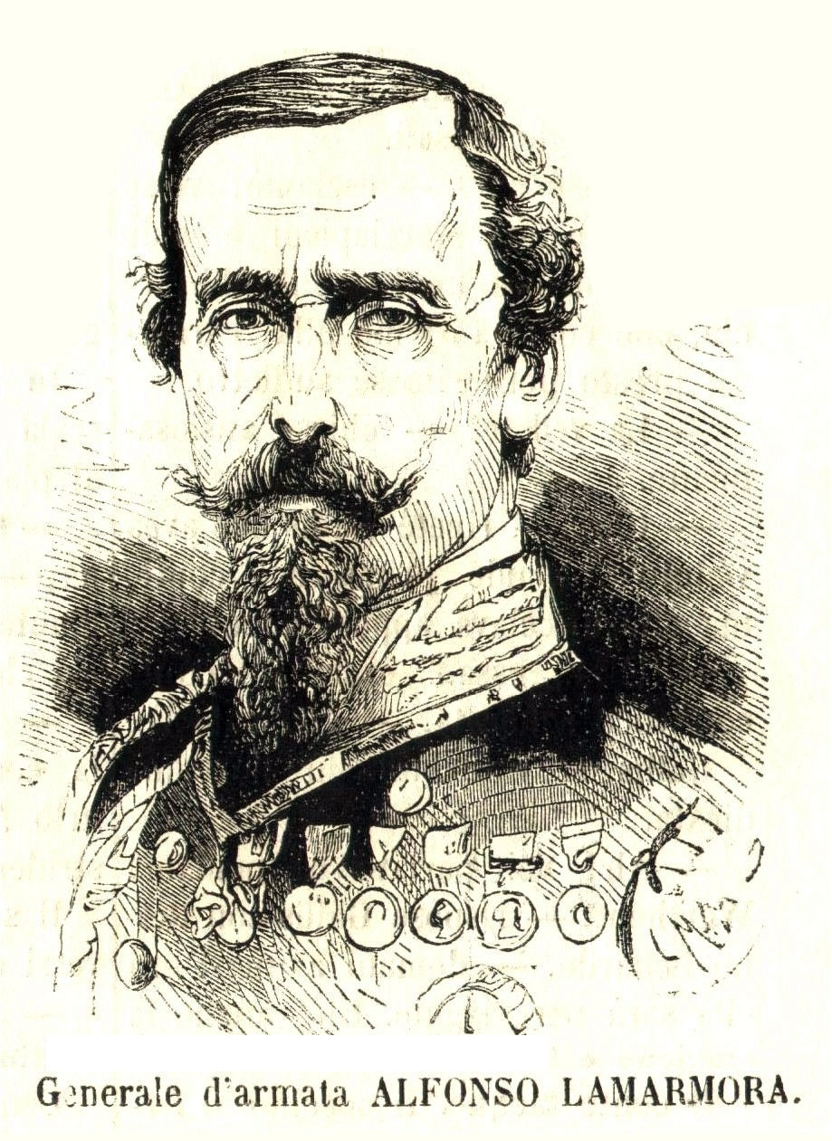 Ritratto del generale Alfonso Lamarmora nel 1866.